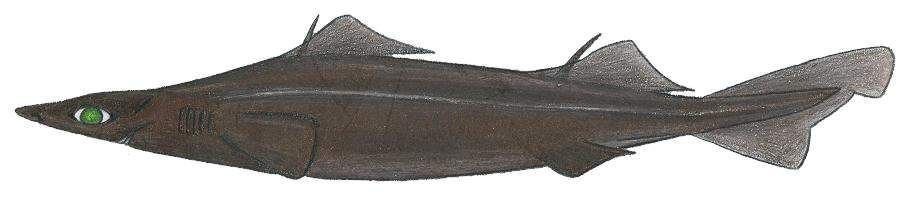 Deania profundorum